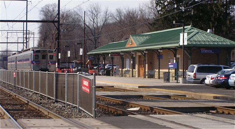 Langhorne SEPTA regional rail station